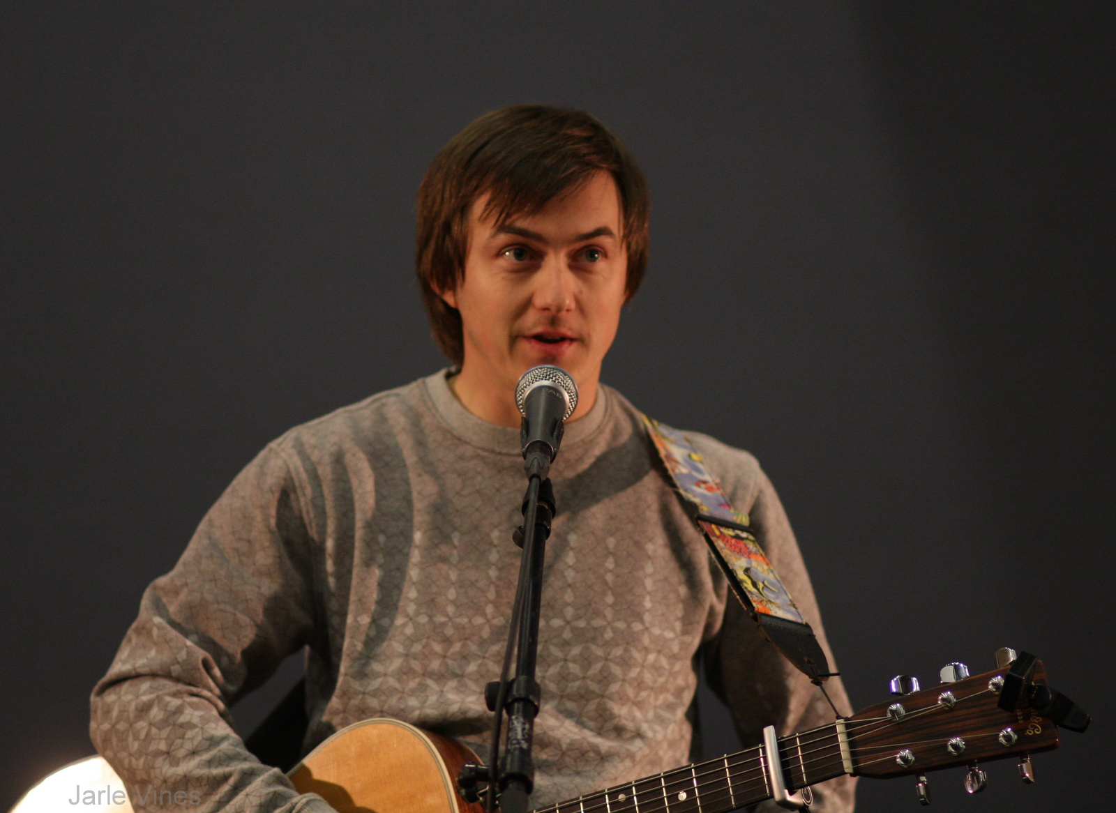 Frank Tønnesen - Tønes norsk artist. I forbindelse med åpningen av det nye Time bibliotek